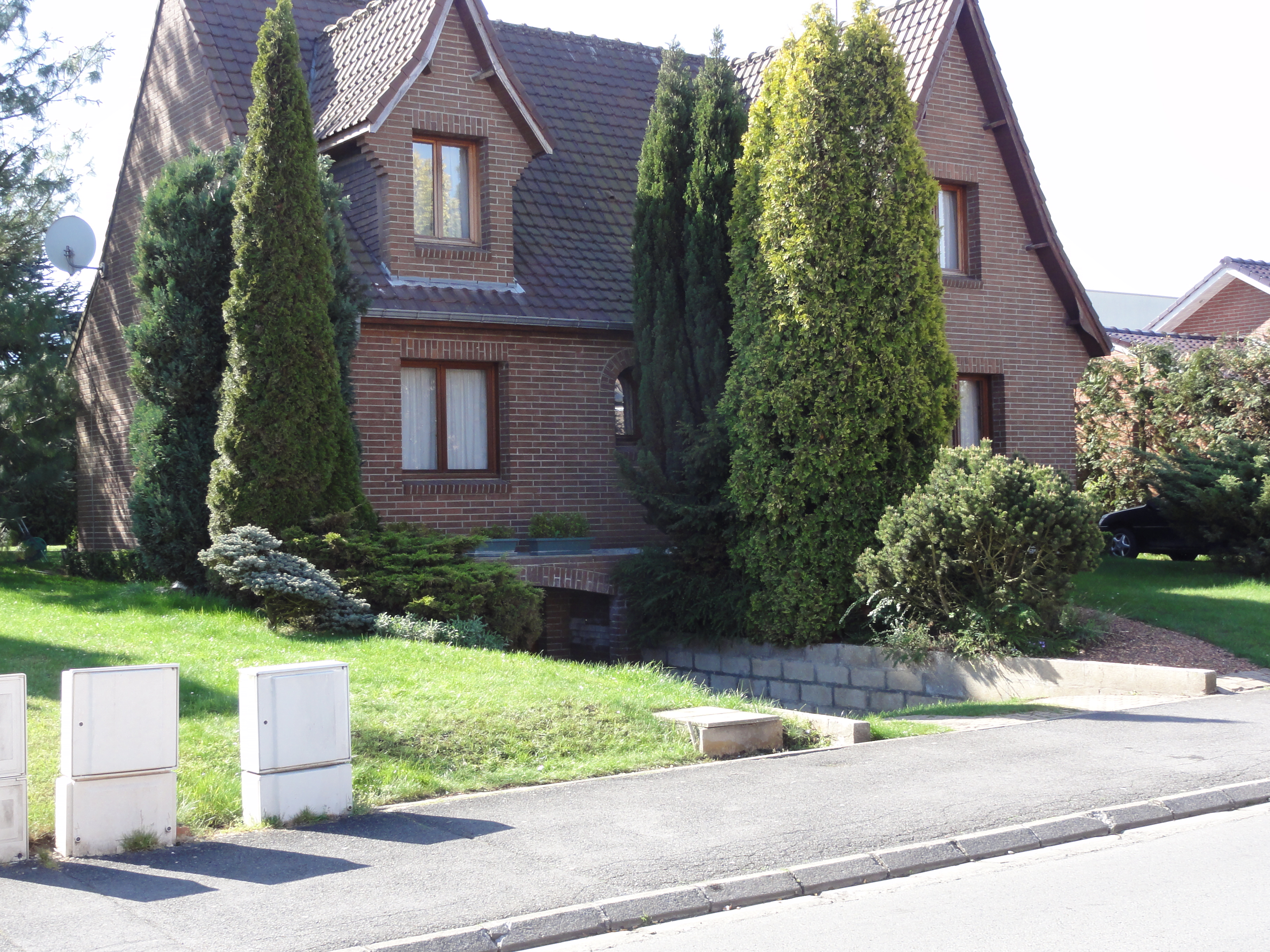 La Fosse Saint Édouard de la Compagnie des mines d'Azincourt était un charbonnage constitué d'un seul puits situé à Aniche, Nord, Nord-Pas-de-Calais, France.